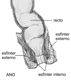 esfínter anal